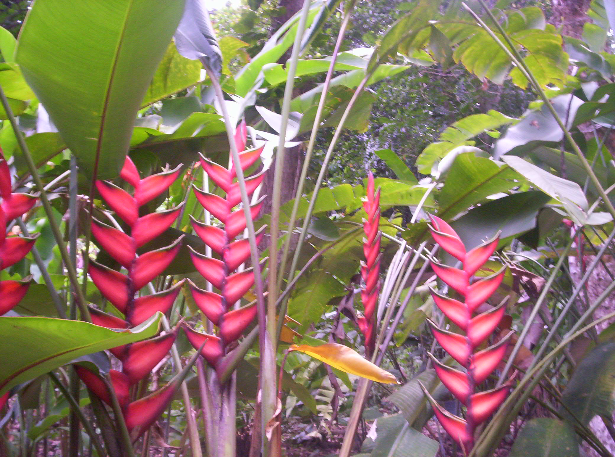 Planta Heliconia latispatha Benth., comúnmente conocida como platanillo, genuina de América Central. Foto tomada en el Jardín Botánico de Río de Janeiro, Brasil.